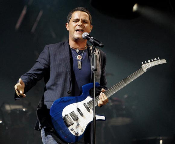 Alejandro Sanz - Concierto en Santiago de Compostela